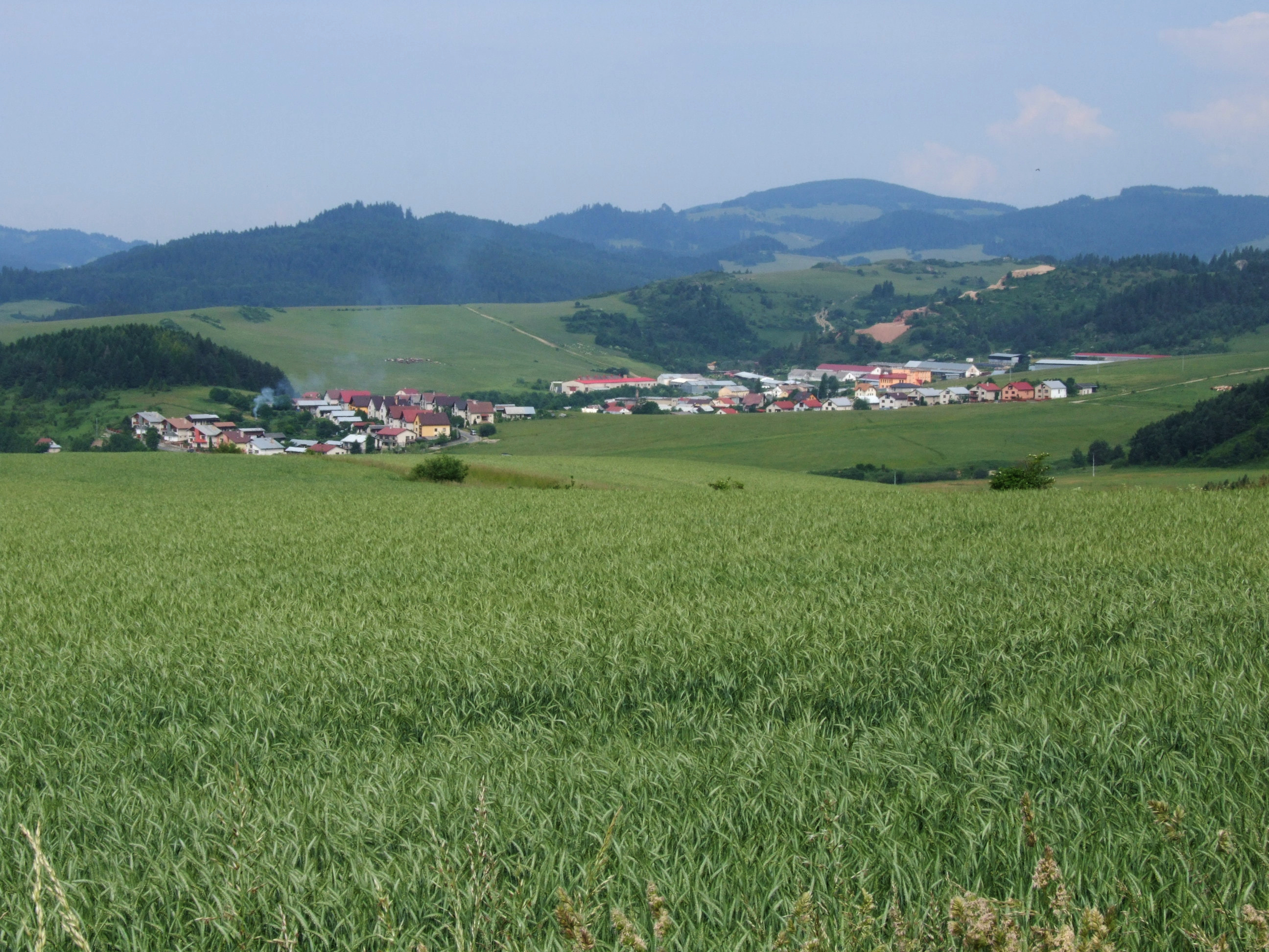 Widok z okolic przełęczy Vabec